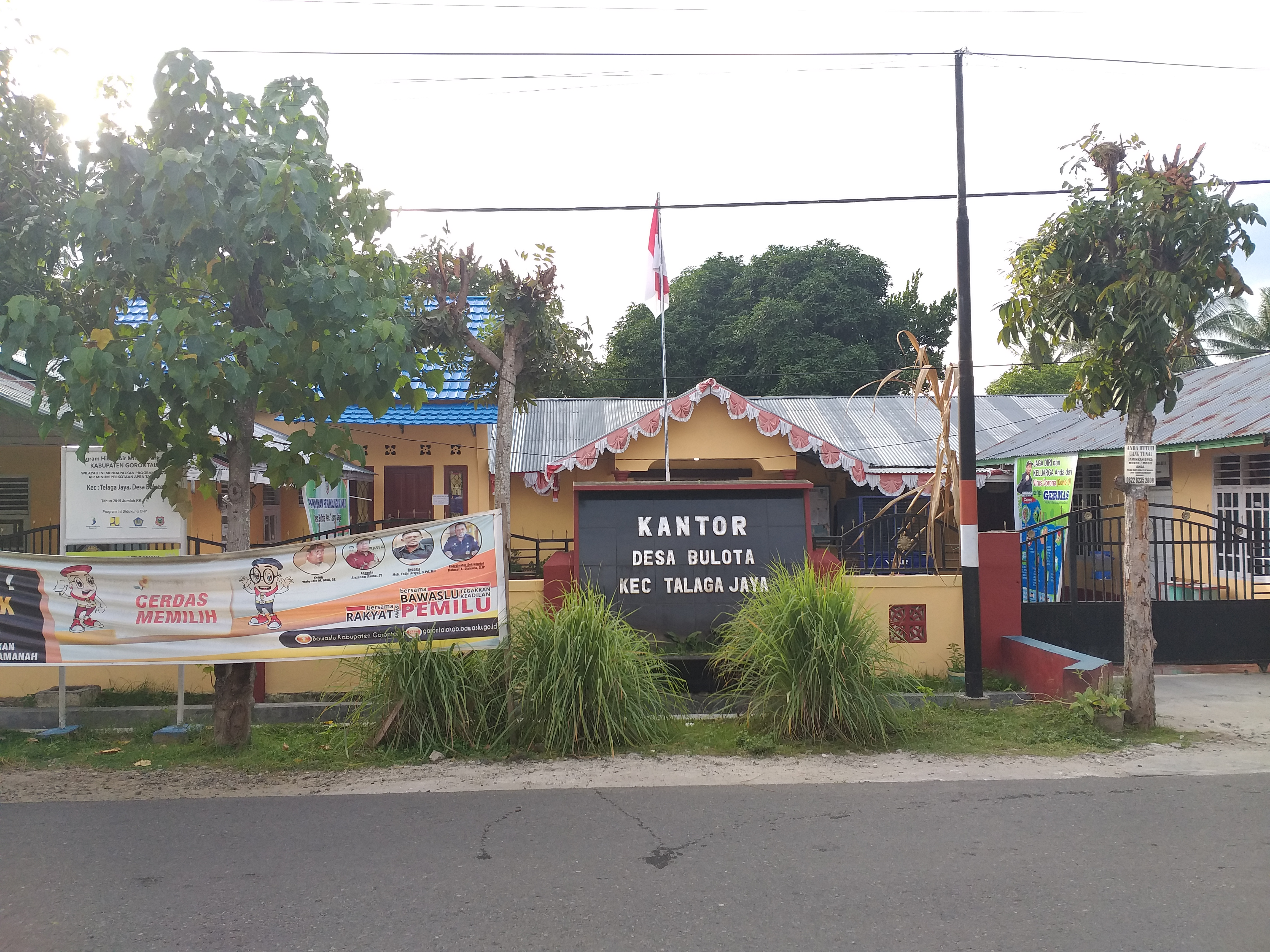 Kantor Desa Bulota Kec. Talaga Jaya Kab. Gorontalo